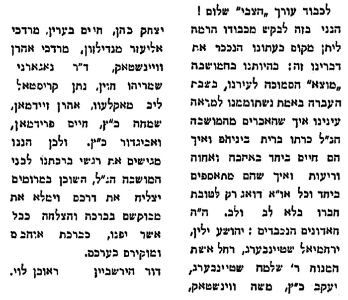 תיאור מפרגן לחלוצי מוצא